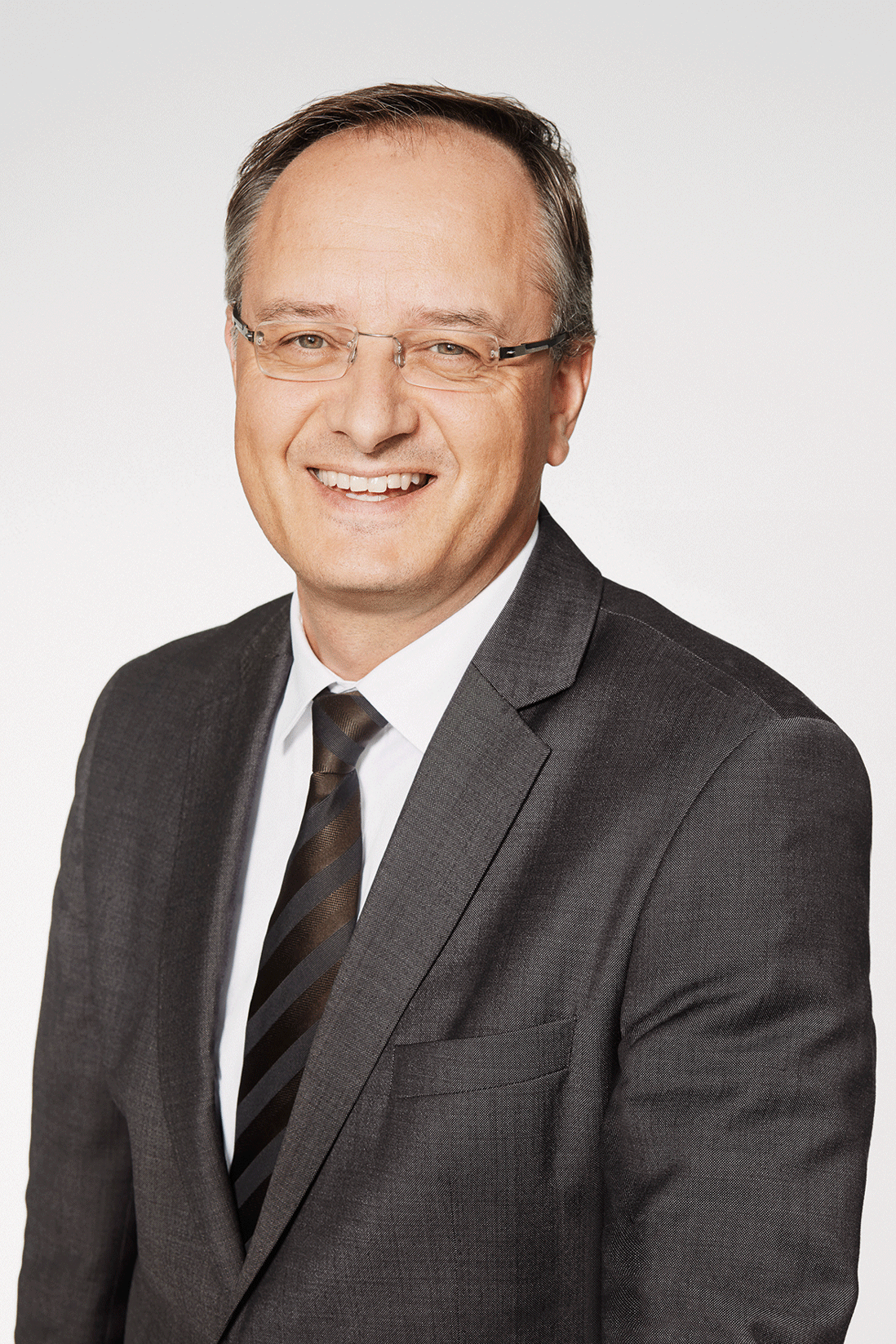 SPD BW-Landtagsabgeordneter Andreas Stock